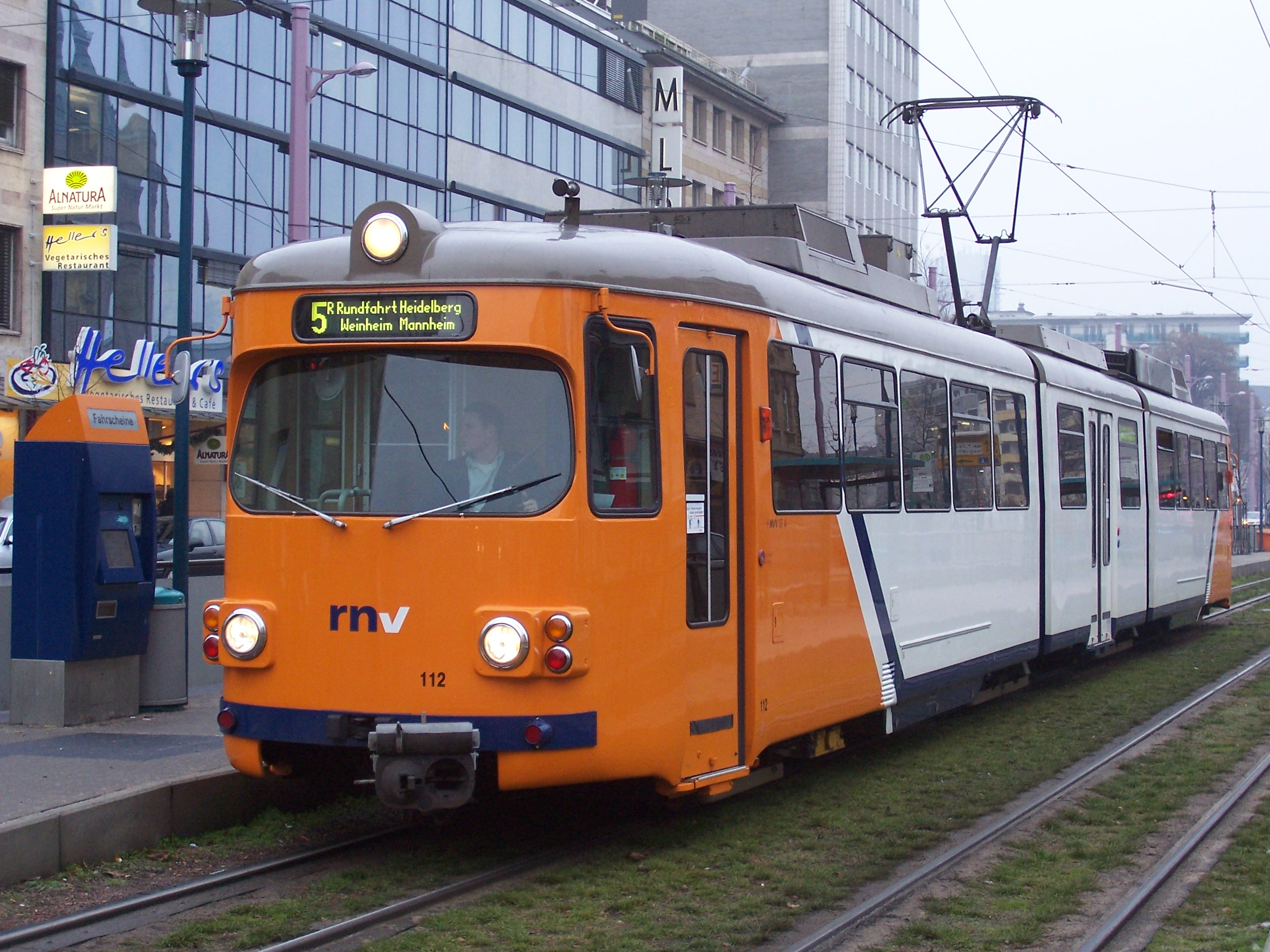 OEG Gt8 Nummer 112 in Mannheim